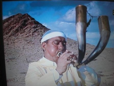 Cheikh Moussa (originaire de Nador) en train de jouer du Zamar.